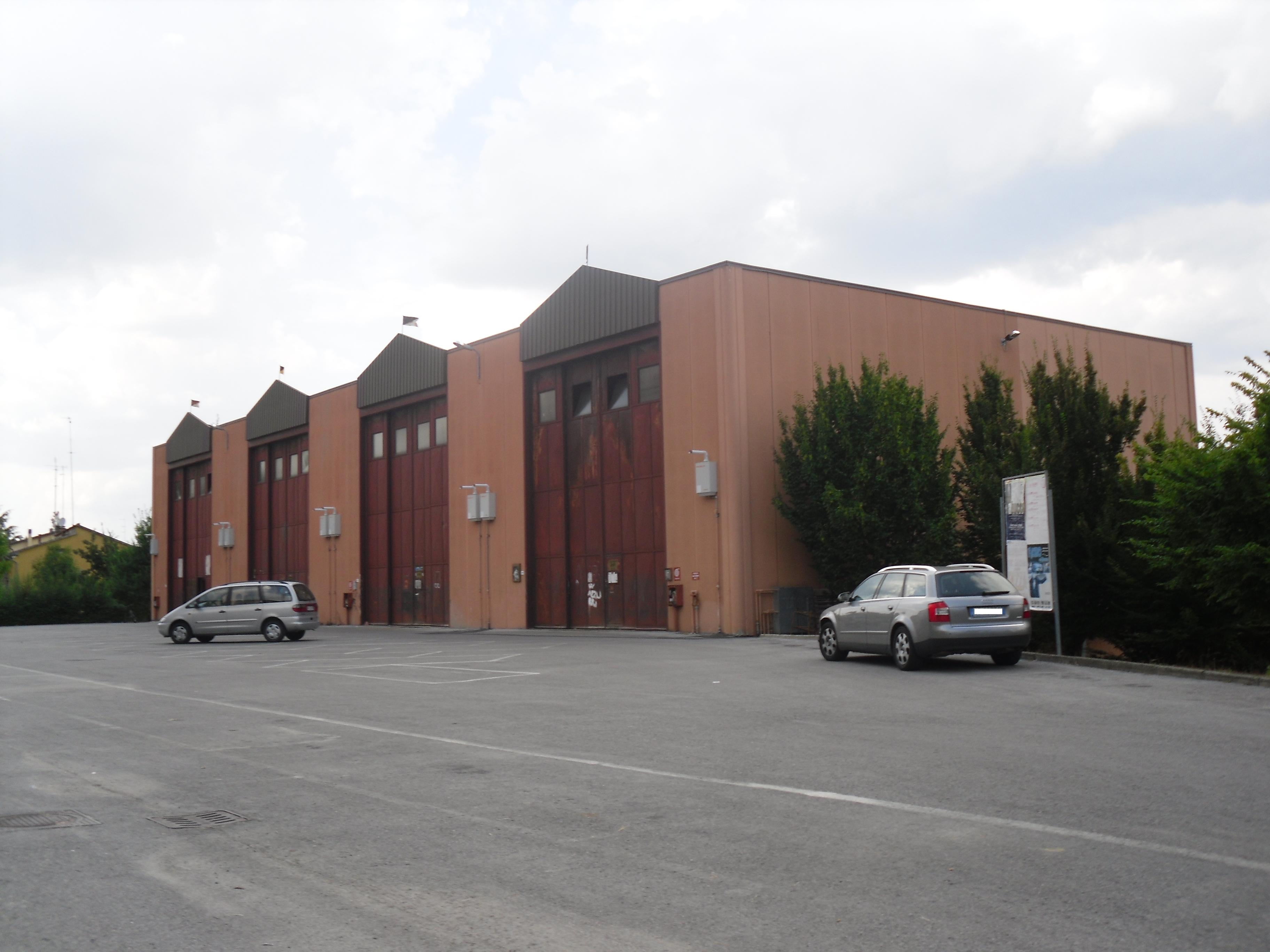 Edificio in cui i quattro cantieri del carnevale di Foiano della Chiana realizzano i carri.